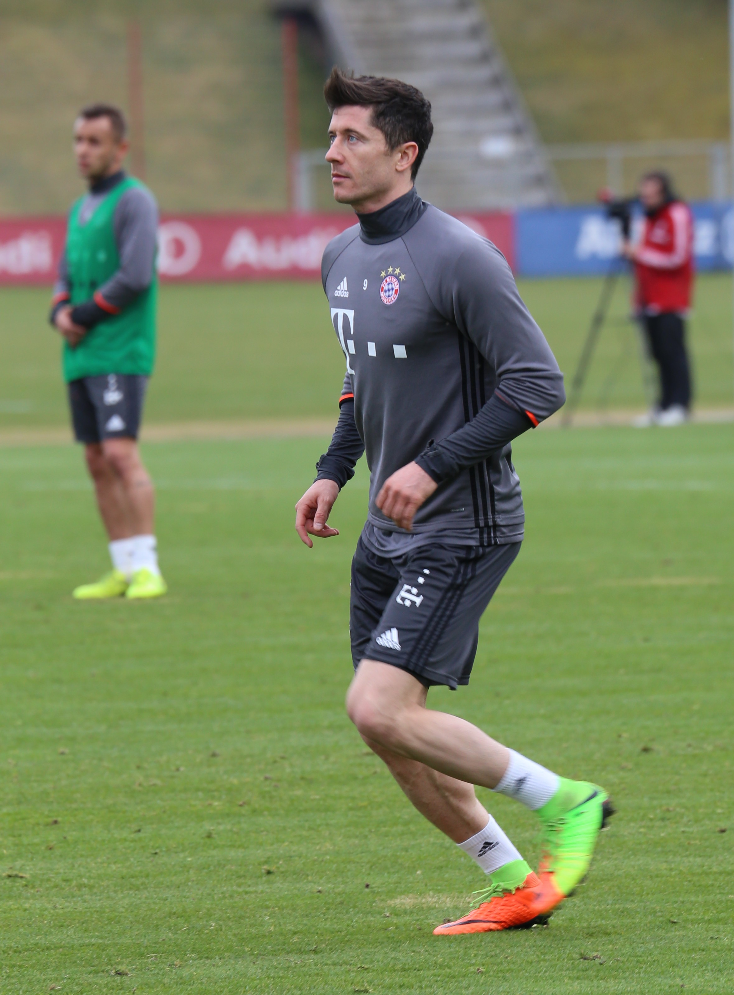 Robert Lewandowski am 14. März 2017 beim Training auf dem Gelände des FC Bayern München